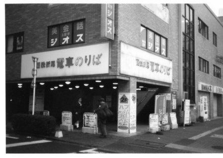 西鉄北九州戦折尾駅